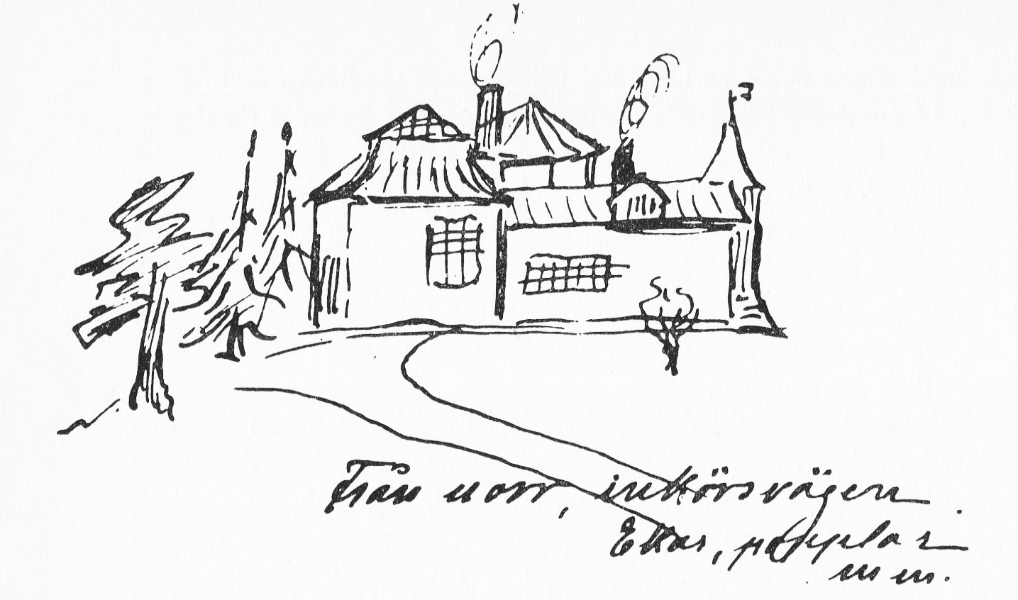 Villa Akleja, Johan Axel Gustaf Ackes skiss